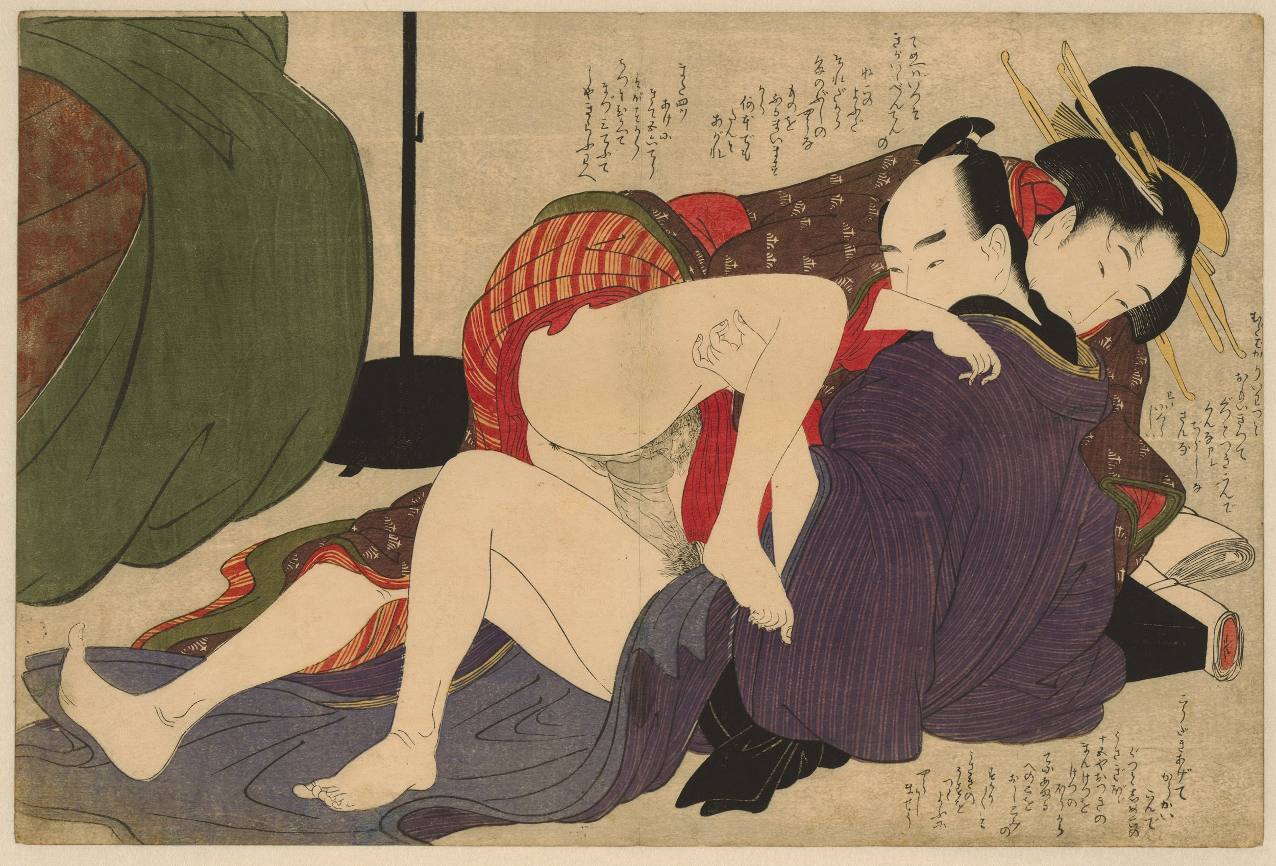 Man in paars-blauwe kimono helpt een geisha bovenop hem. Links, in de achtergrond, een groene opgerolde deken en de onderkant van een lantaarn. Tiende van dertien prenten uit het album Negai no itoguchi (ook wel vertaald met: The prelude to desire). Label Line: Kitagawa Utamaro (1753 - 1806), 1799, kleurenhoutsnede; lijnblok in zwart met kleurblokken Collection: prenten; Japan (collectie)